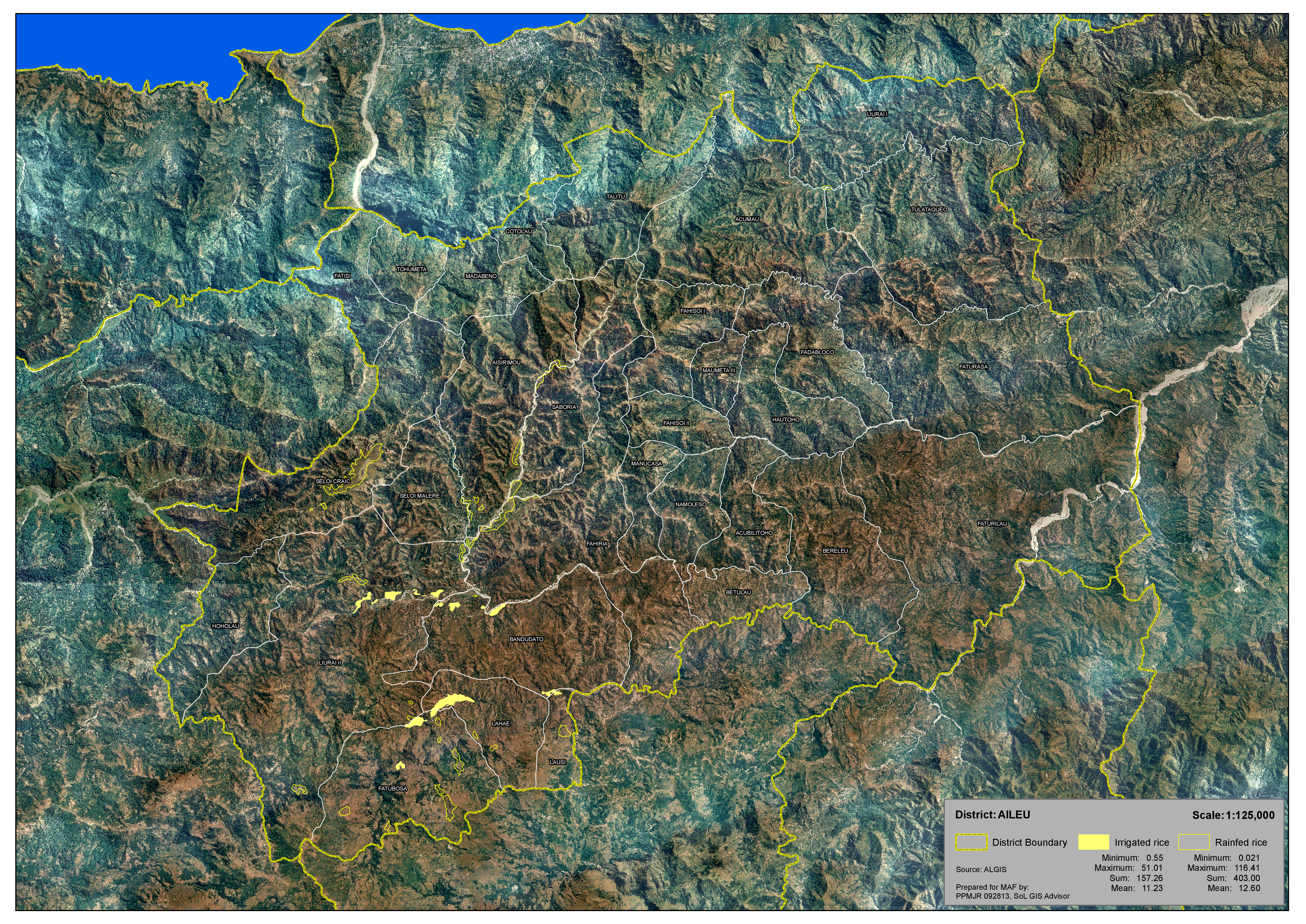 Reisfelder im Distrikt Aileu